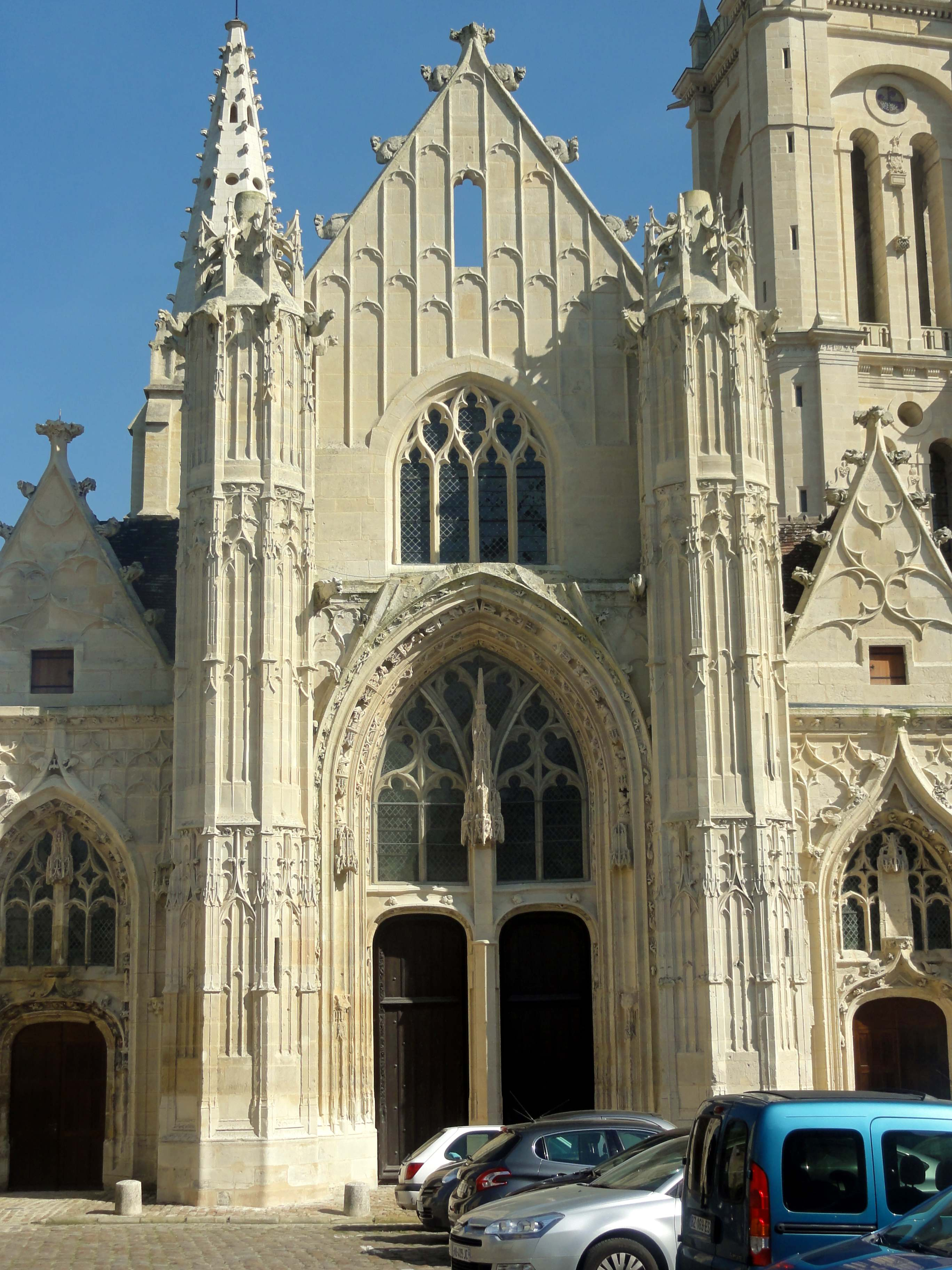 Église Saint-Pierre de Senlis - voir le titre du fichier.